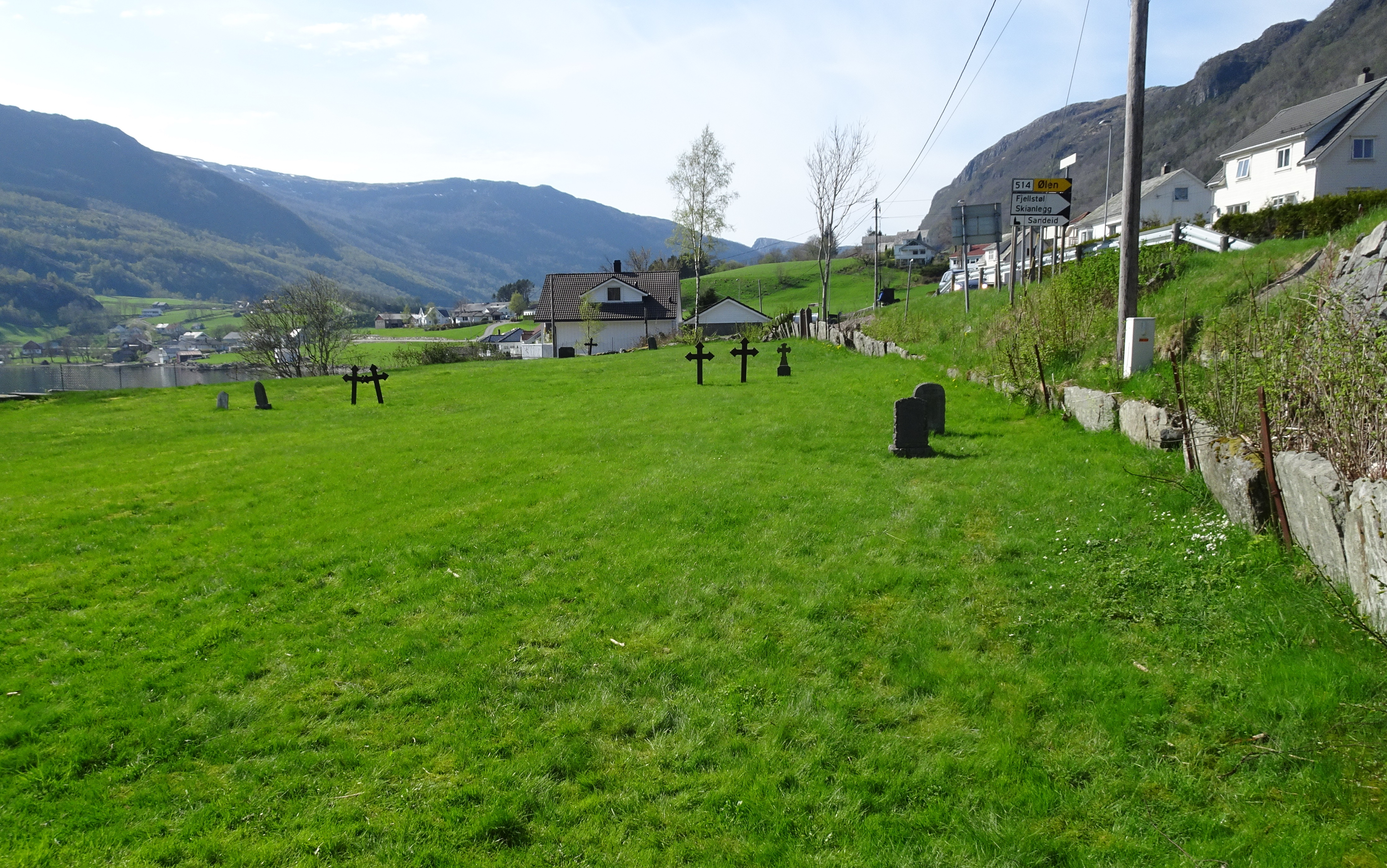 Sandeids tidligere kirkested